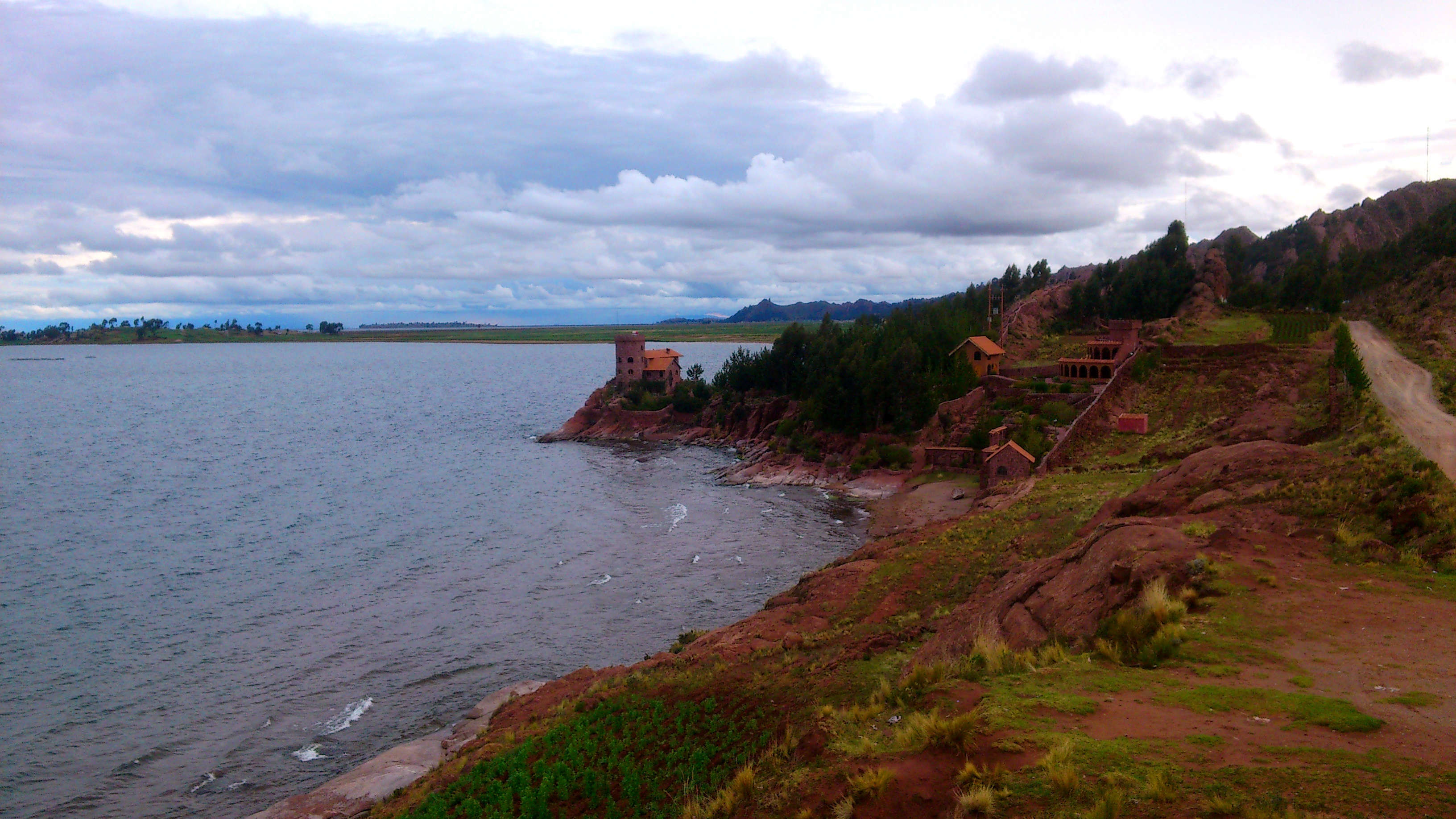 Puno Maravilla Natural